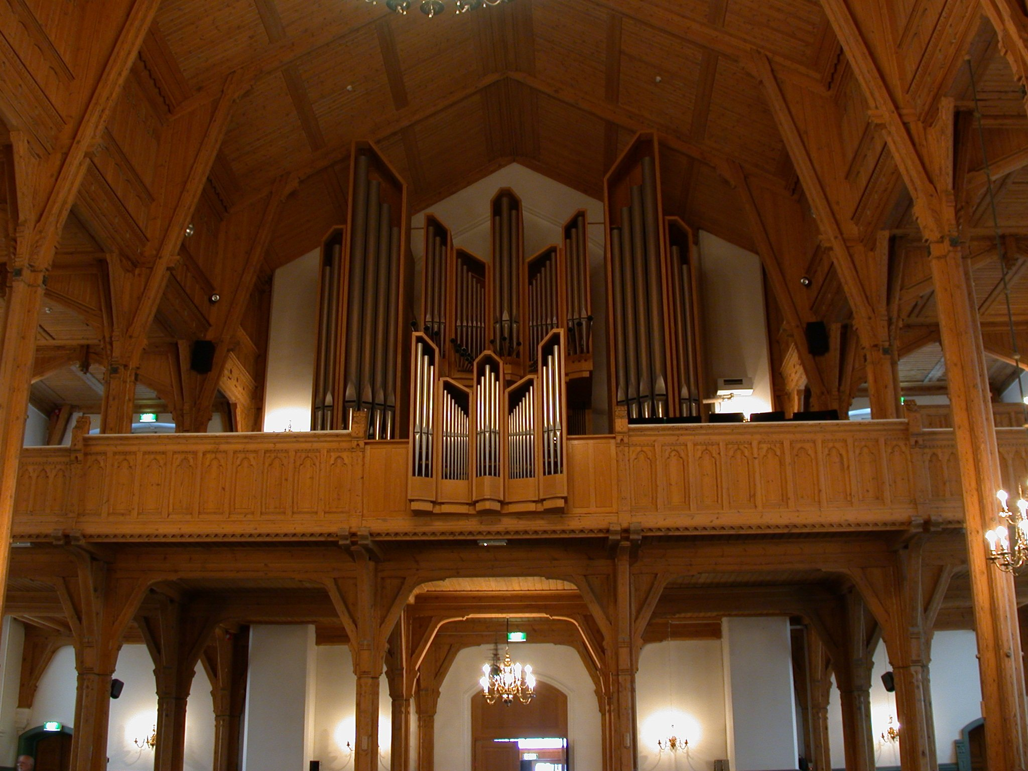 Orgelet i Kristiansand domkyrkje